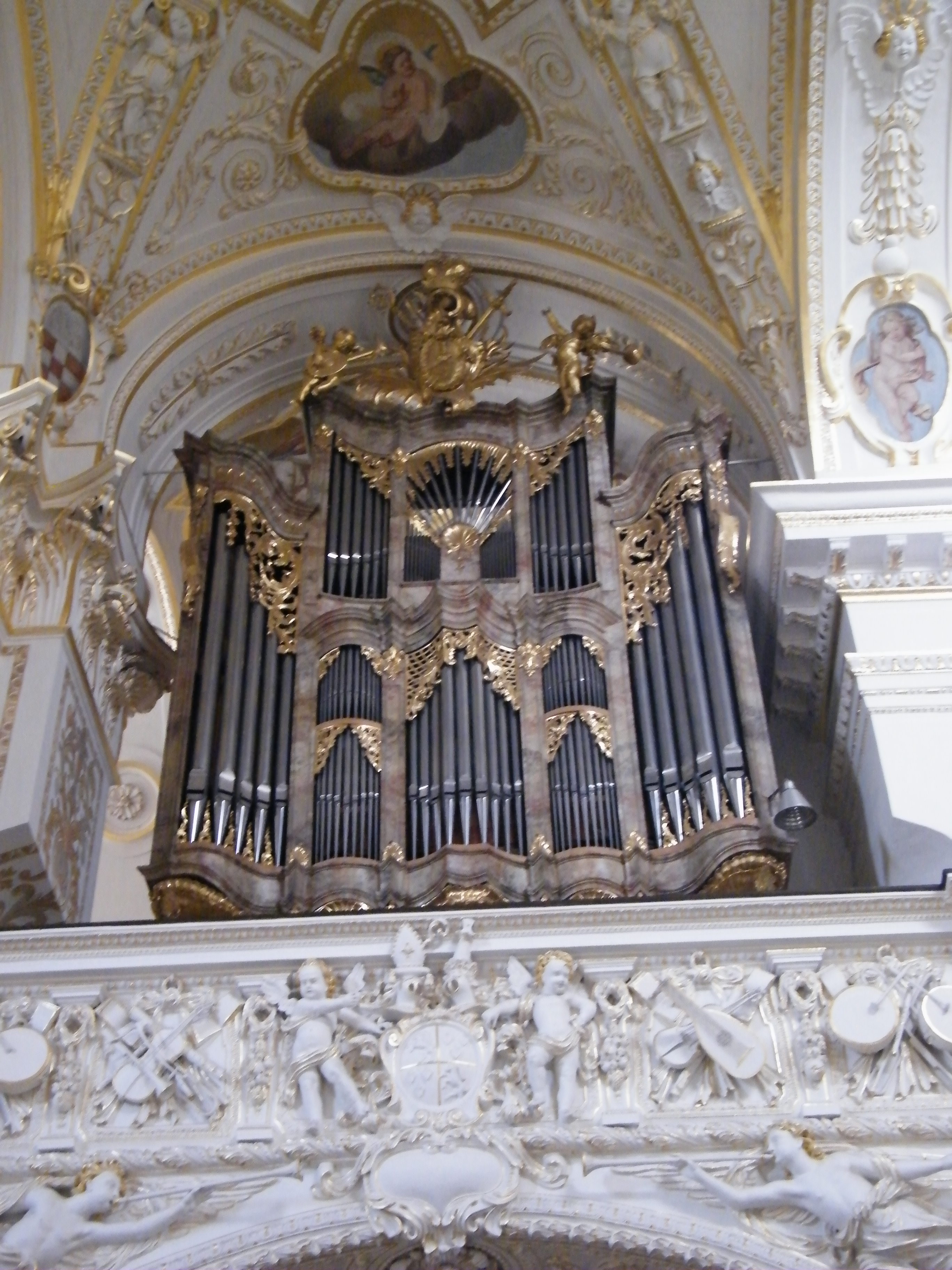 Nebenorgel in St. Lorenz, Kempten